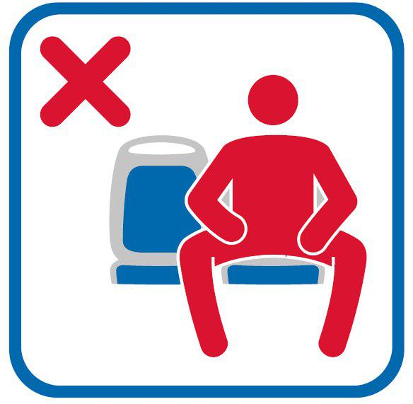 La Empresa Municipal de Transportes (EMT) va a incorporar a la señalización informativa al usuario que se encuentra en el interior de su flota de autobuses un pictograma específico para evitar el manspreading (término inglés que denomina la postura de los hombres que abren excesivamente sus piernas cuando se sientan ocupando los asientos contiguos al suyo). Este nuevo icono informativo es similar al que ya existe en otros sistemas de transporte a escala mundial para indicar la prohibición de mantener una postura corporal que incomoda a otras personas.